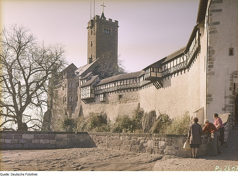 Original image description from the Deutsche Fotothek Eisenach. Wartburg, Blick auf den Elisabethengang und Bergfried